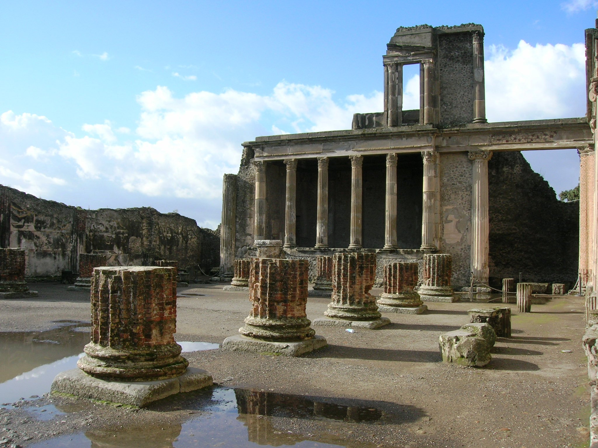 La Basilica di Pompei